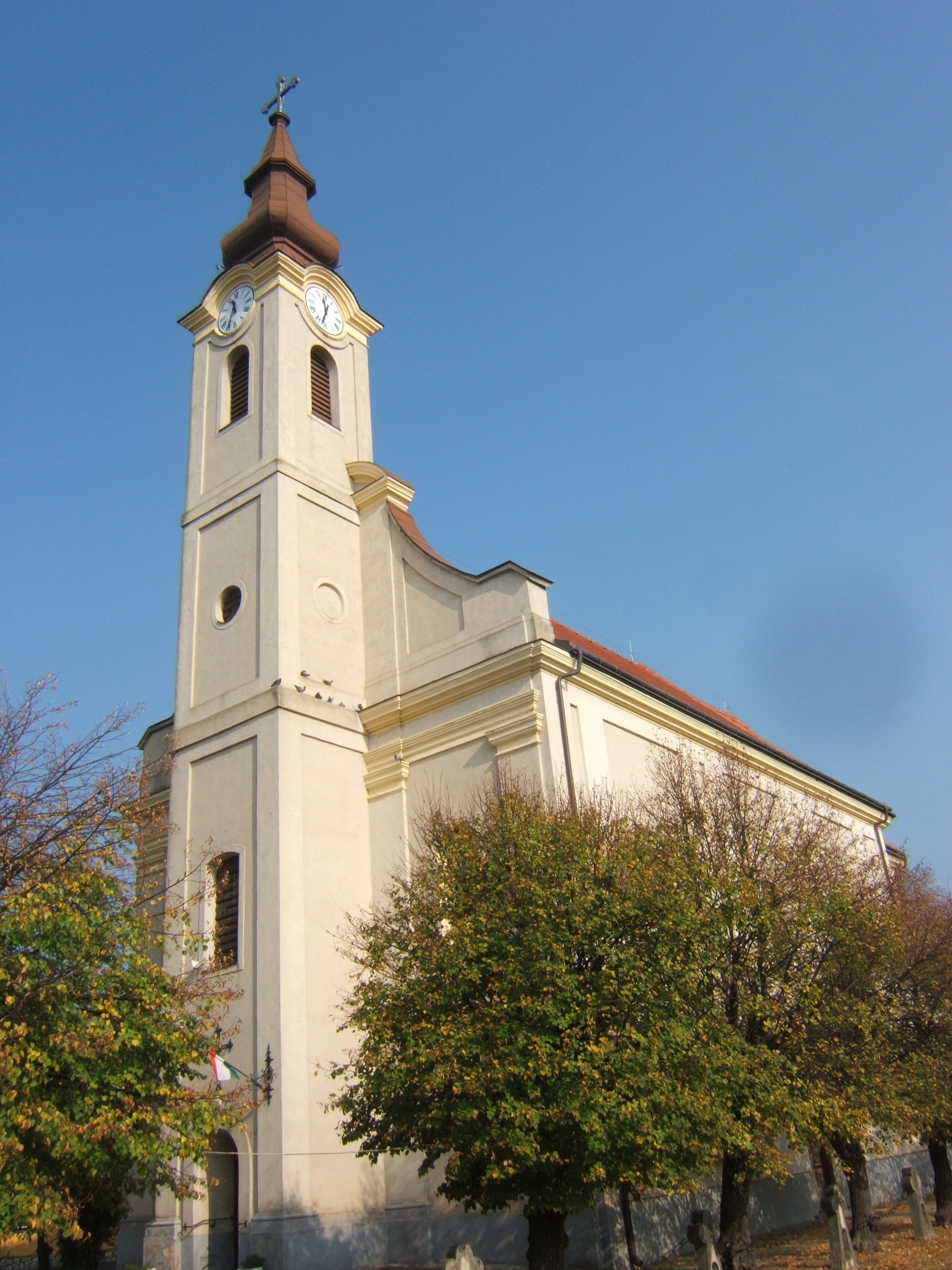 Káptalanfa, templom